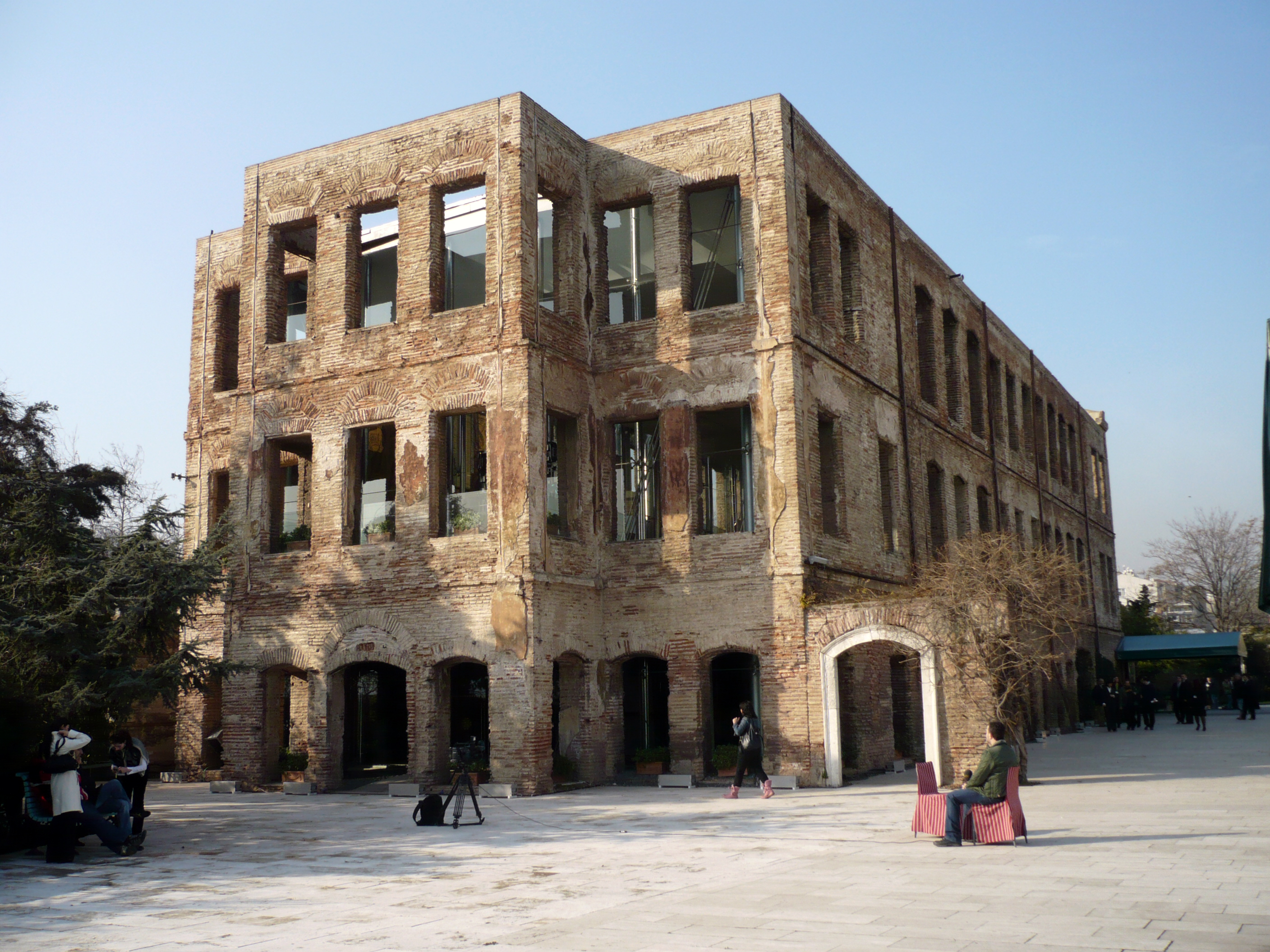 Esma Sultan Yalısı, Ortaköy, İstanbul, Türkiye